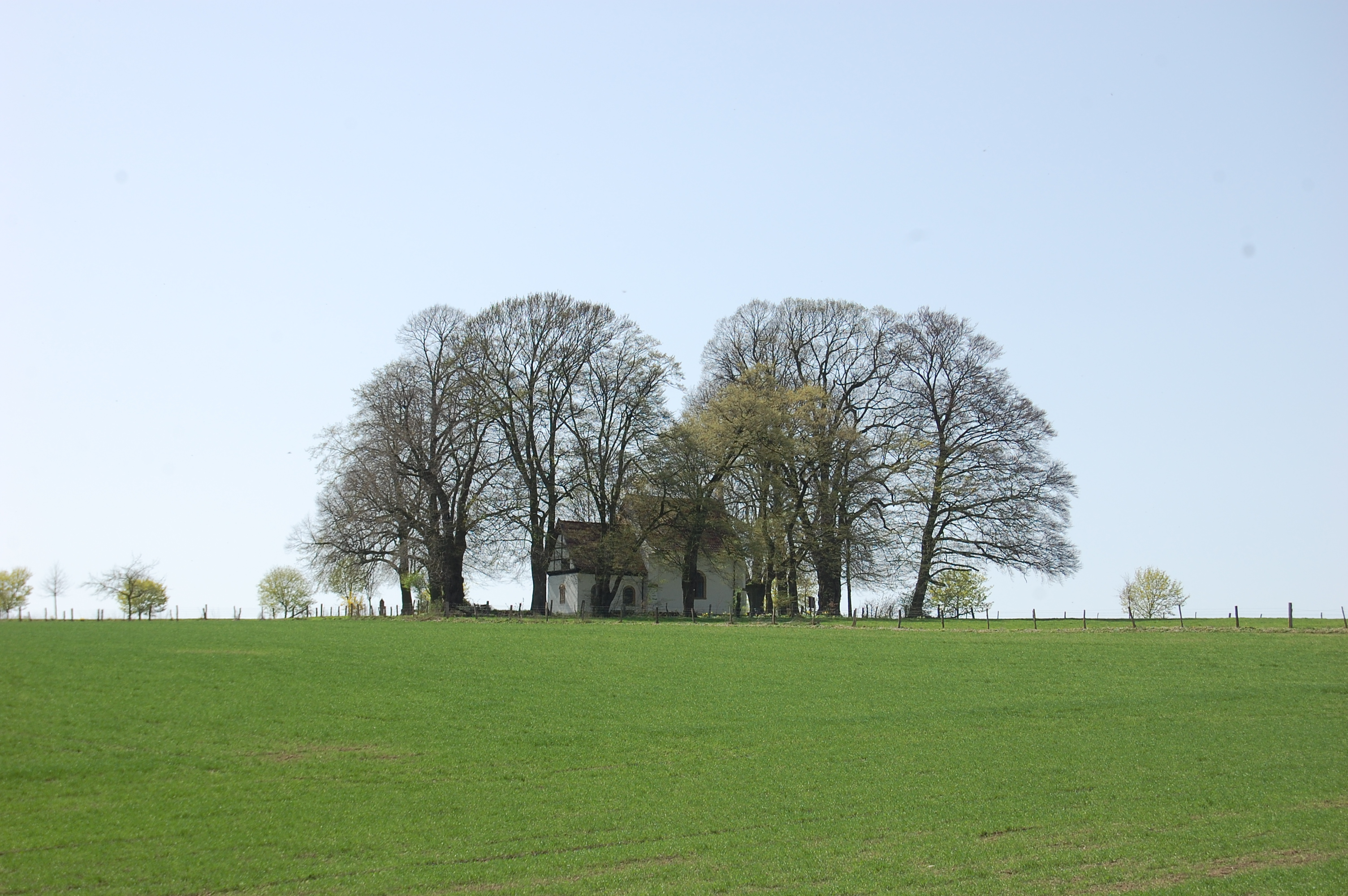 Kapelle „zur Hilligen Seele“, westlich von Borchen-Dörenhagen, Kreis Paderborn, Nordrhein-Westfalen, Deutschland